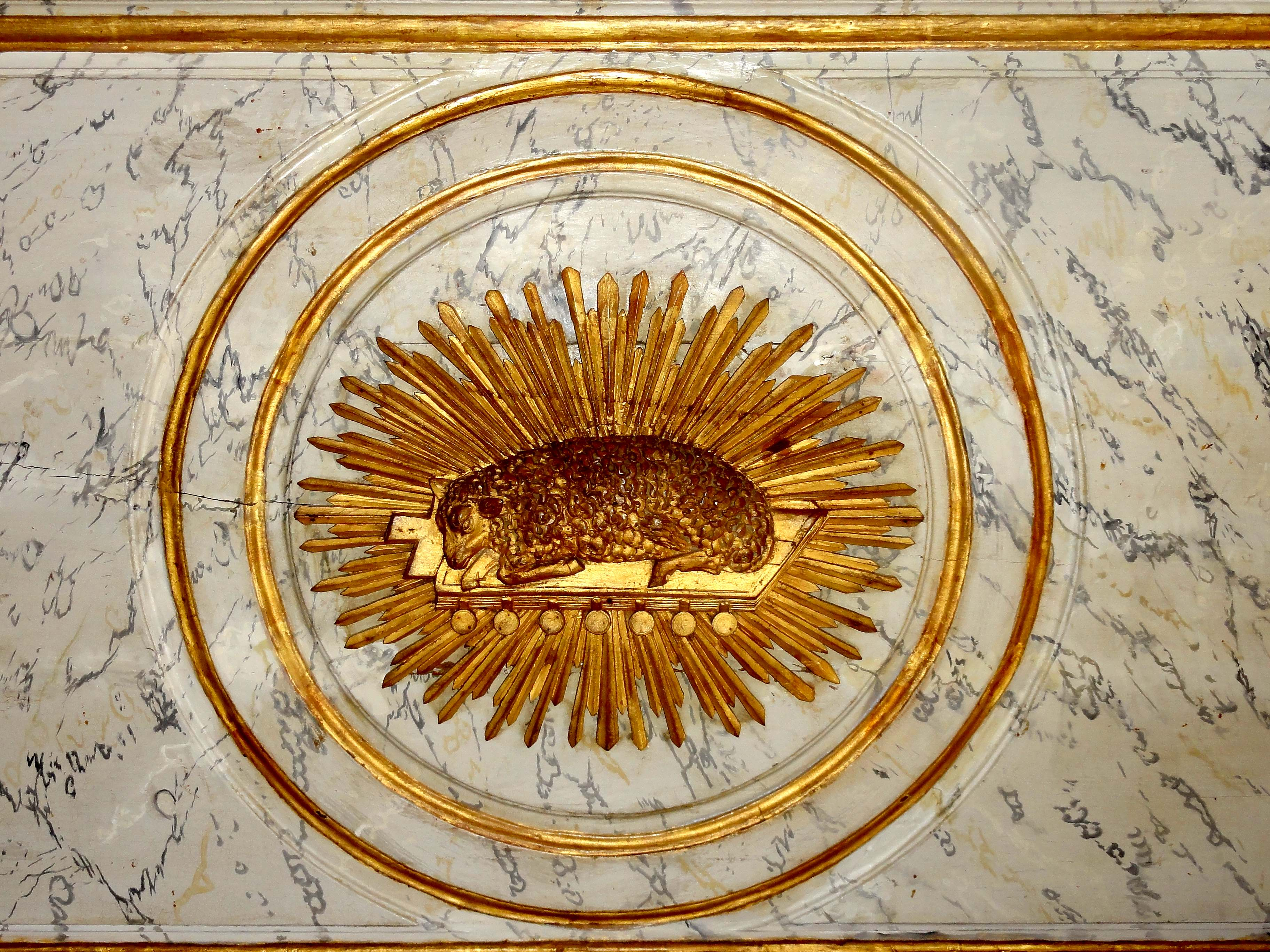 Mobilier de l'église (voir titre).